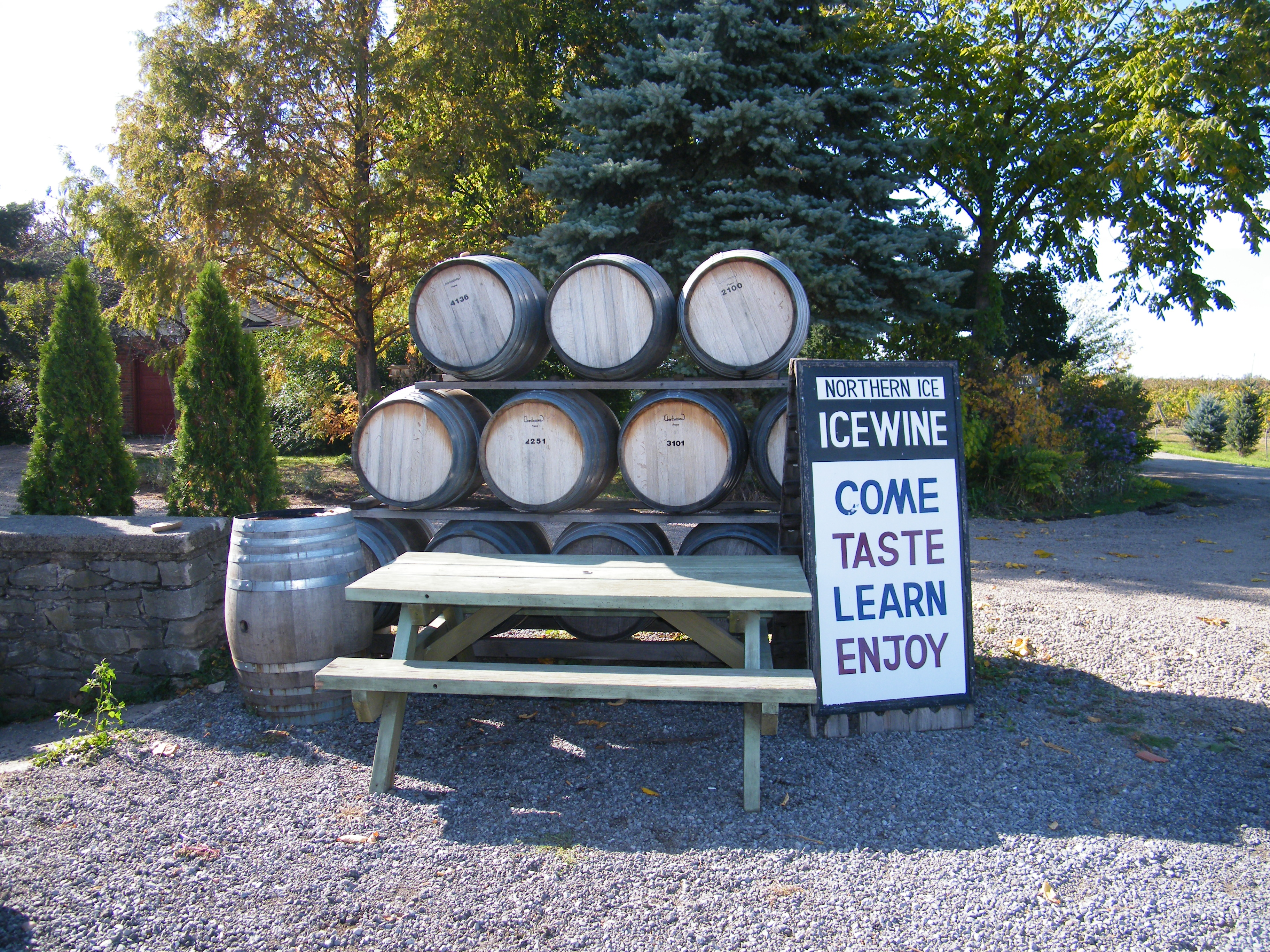 雪厂酒厂